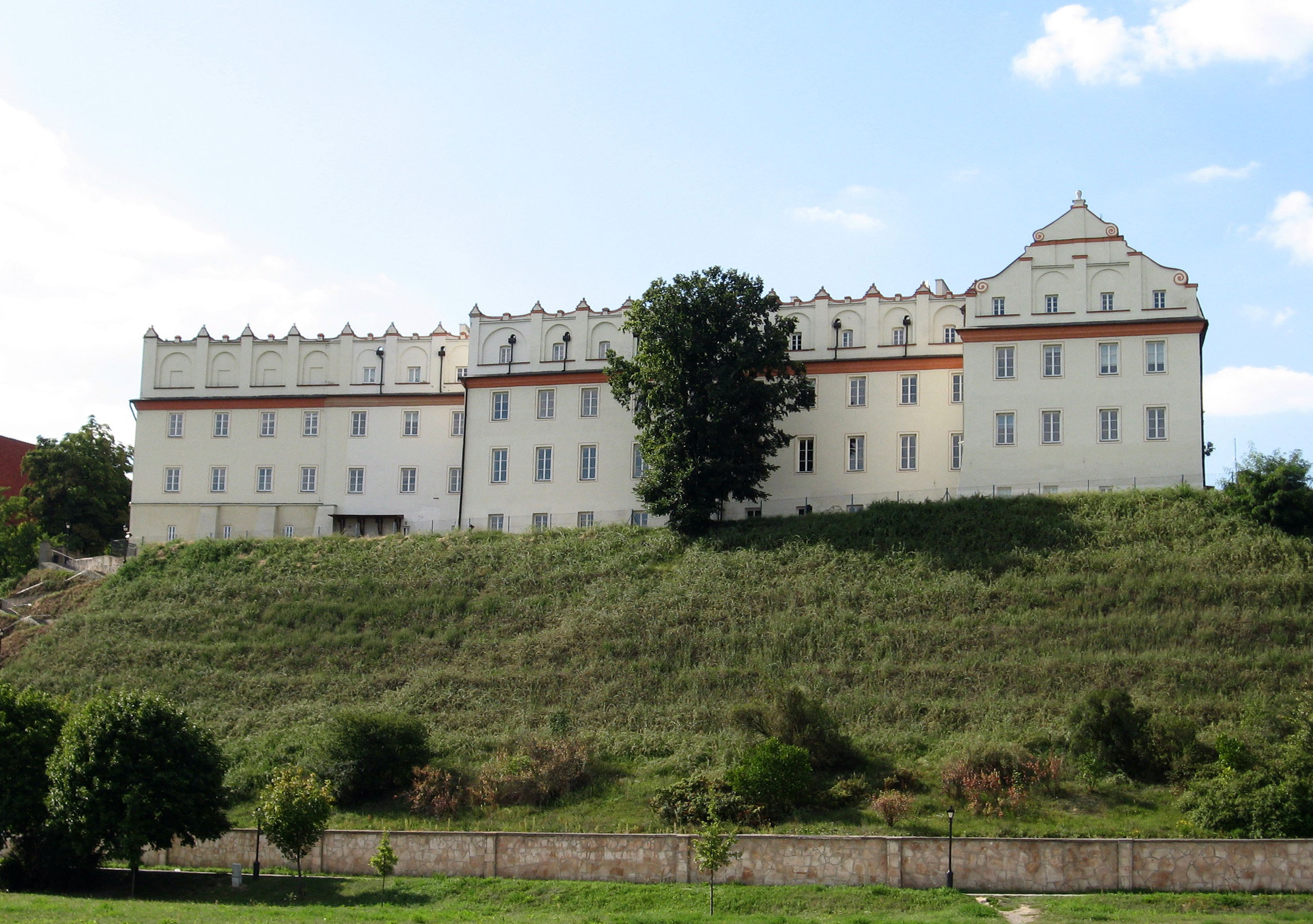 Collegium Gostomianum w Sandomierzu / Collegium Gostomianum in Sandomierz